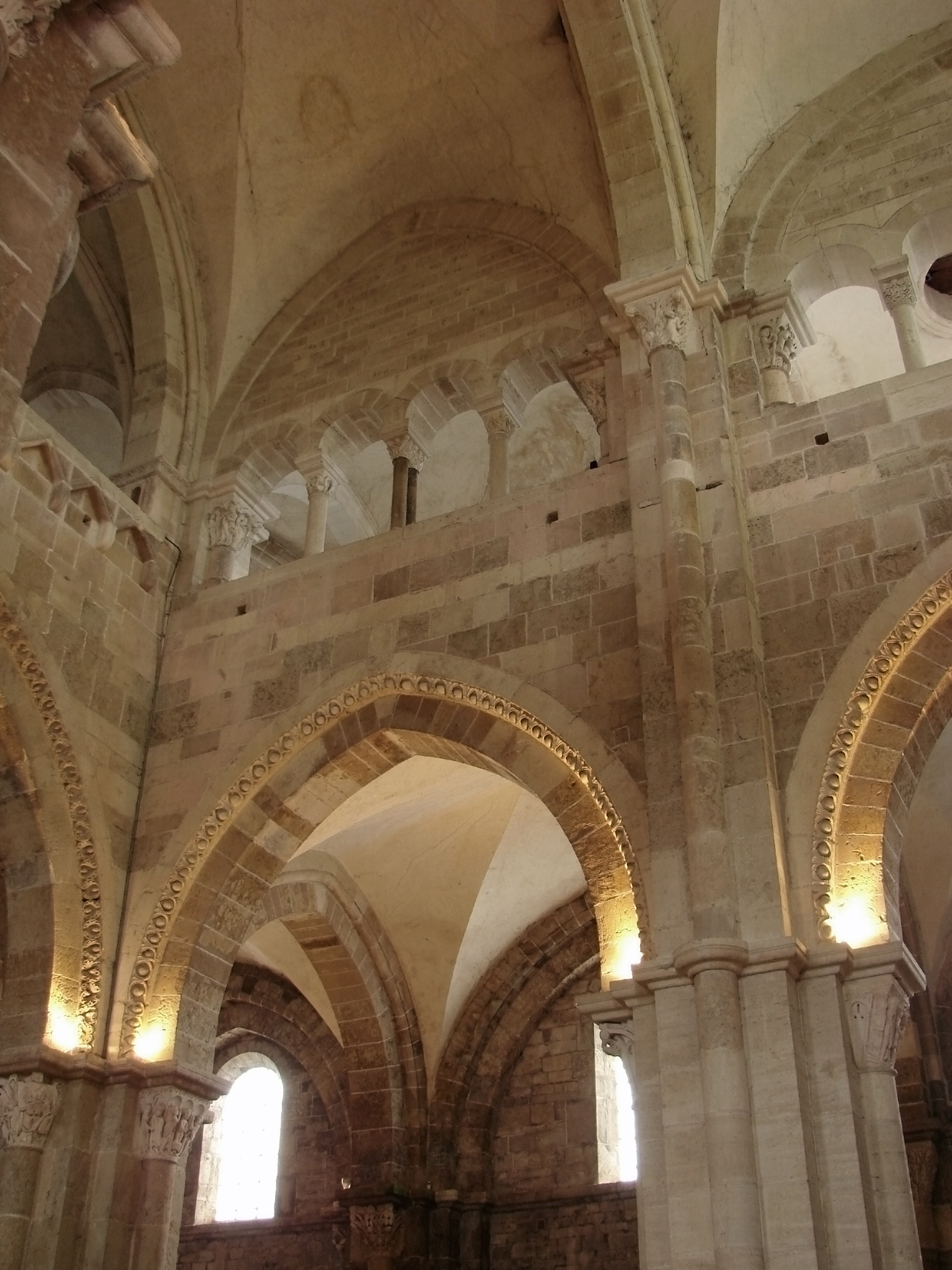 Vue du narthex; milieu du 12ème siècle. Basilique Sainte-Marie-Madeleine de Vézelay.